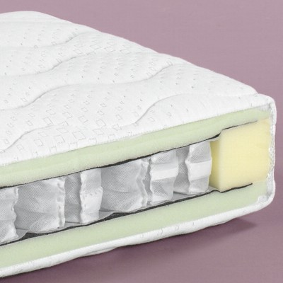 Schnitt-Mikro-Taschenfederkern -Matratze